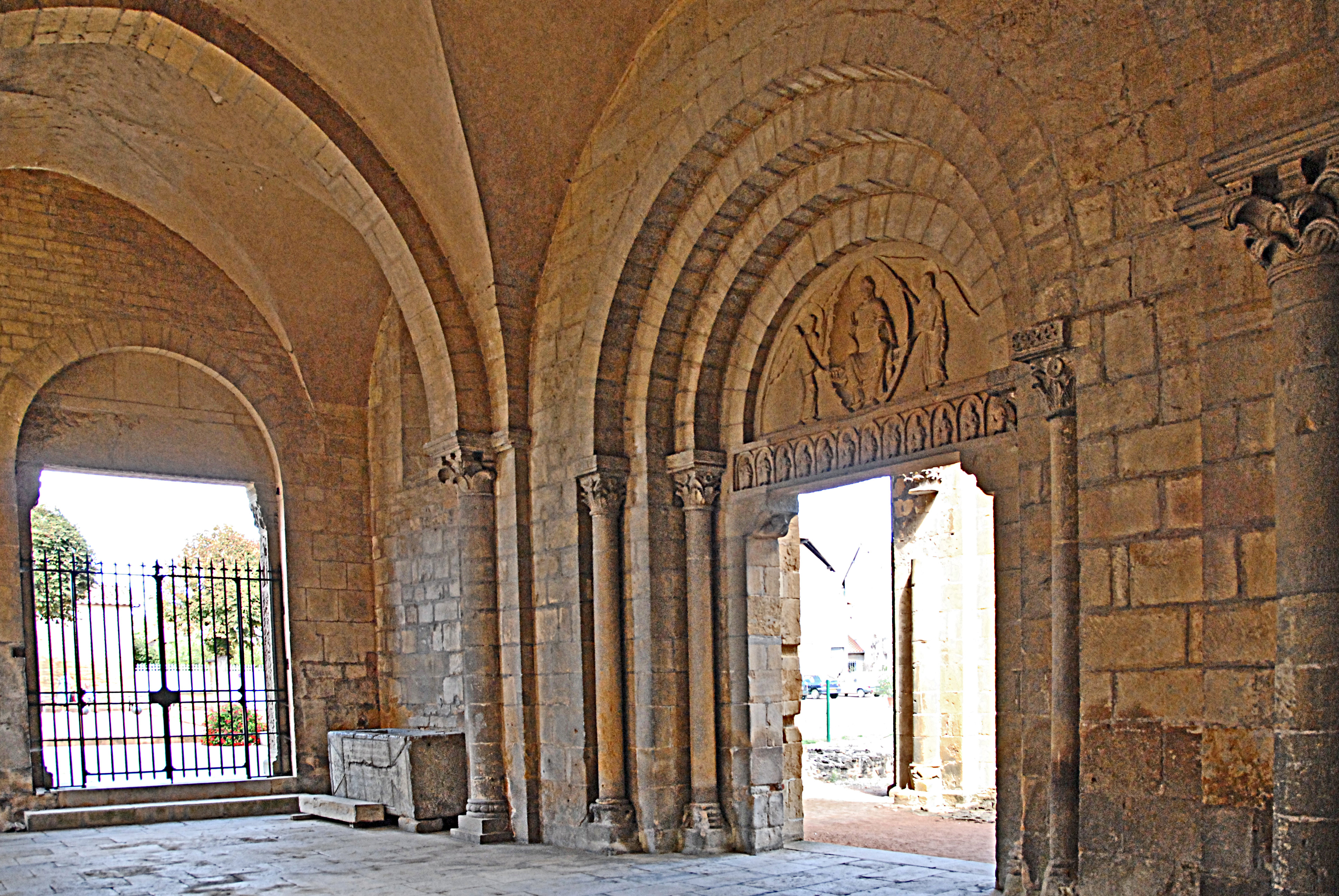 Narthex EG, Inneres